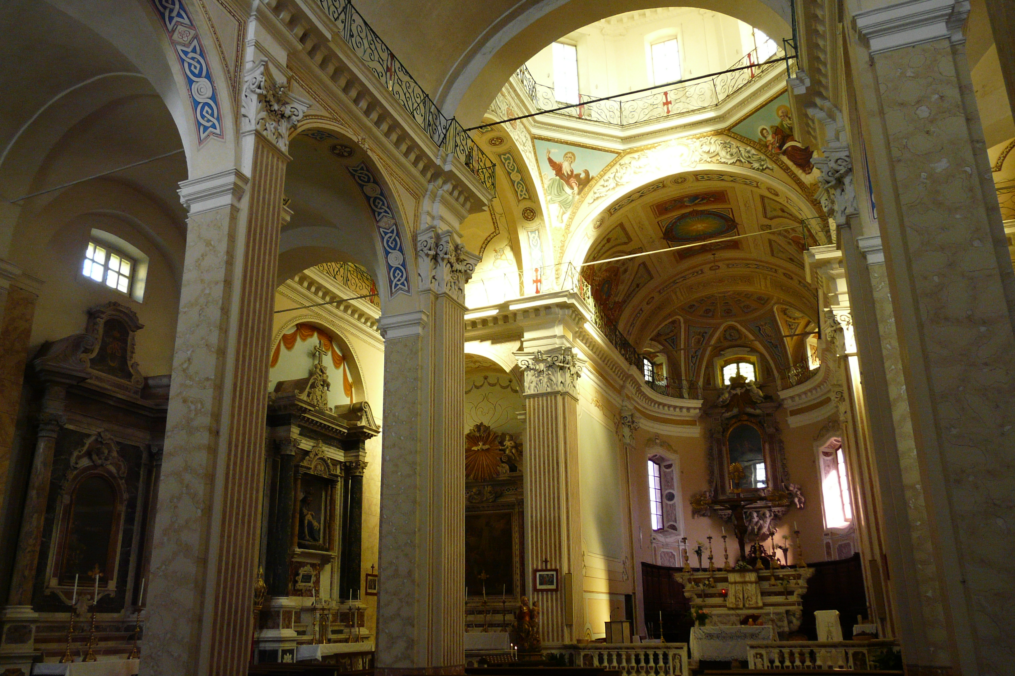 Chiesa dei Santi Sebastiano e Maria Assunta, Vezzano Ligure, Liguria, Italia